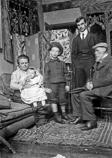 La famille d'auguste Renoir, vers 1902-1903, 73 rue Caulaincourt, Paris. Auguste Renoir, sa femme, Pierre Renoir, Jean Renoir et Claude Renoir (bébé). Fond Vollard, musée d'Orsay, Paris. Fonds Vollard